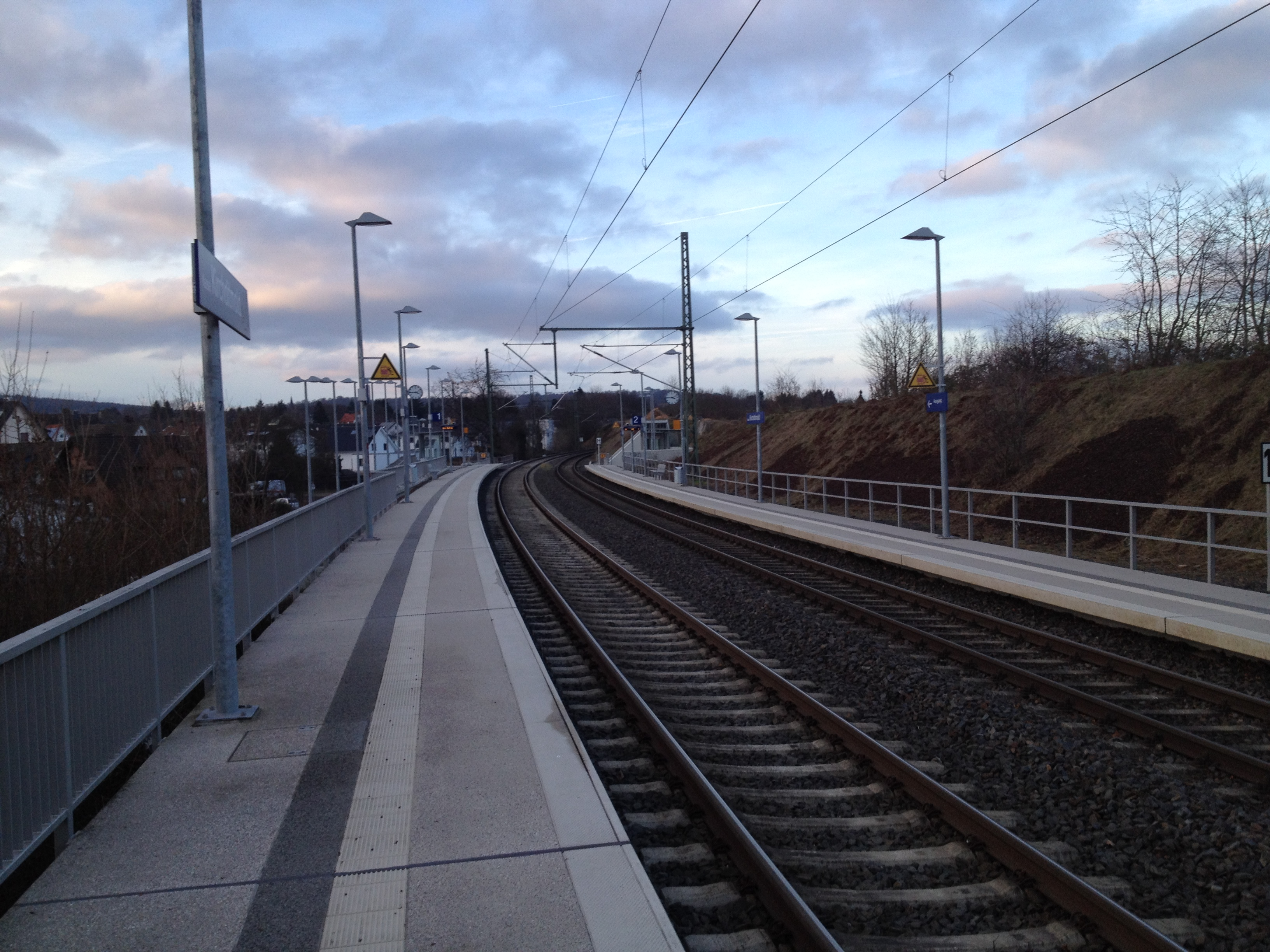 Der Bahnhof Kirchditmold, rechts am dem erhöhten Damm verlieft früher ein drittes Gleis